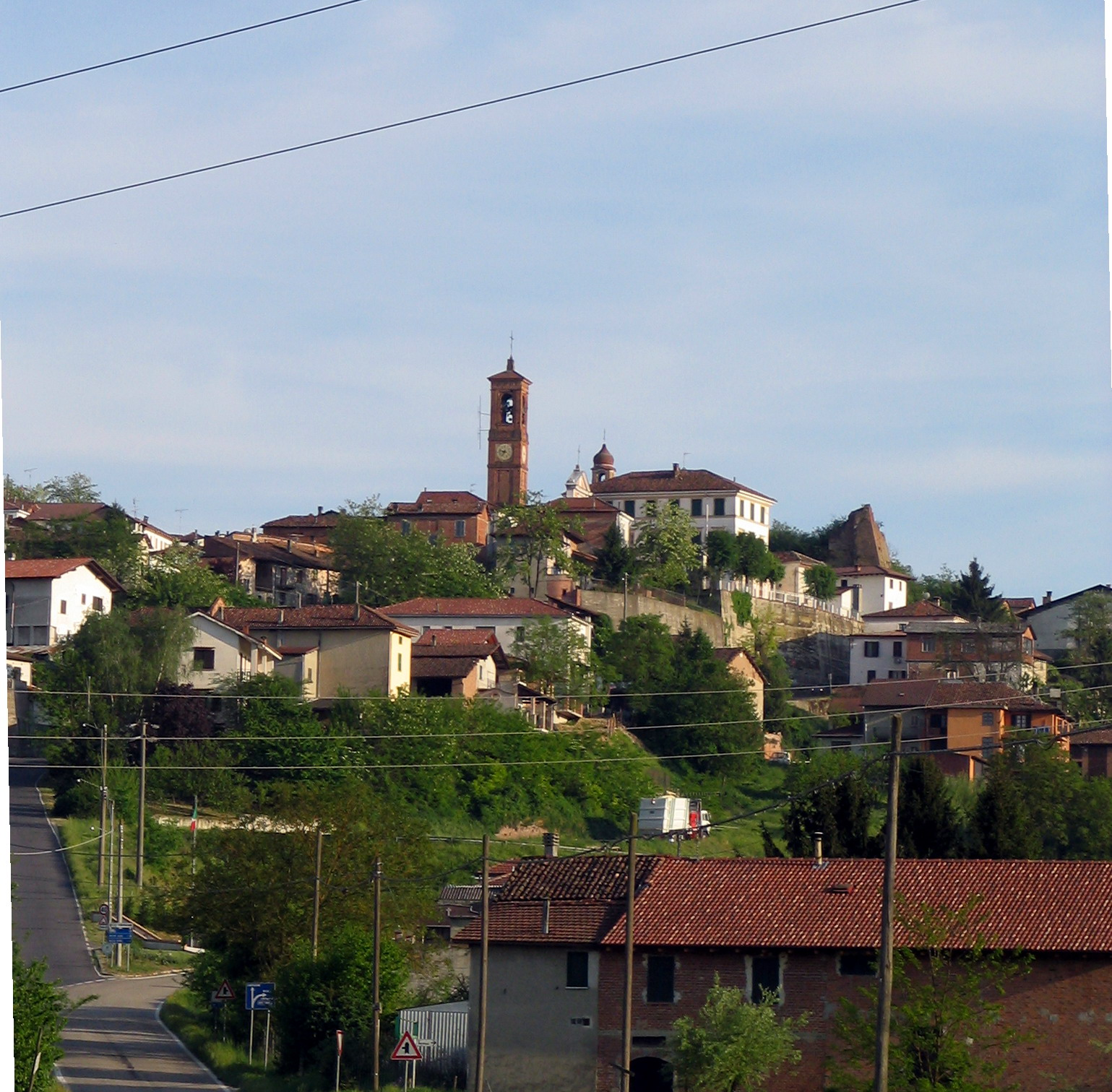 Cortiglione (AT)